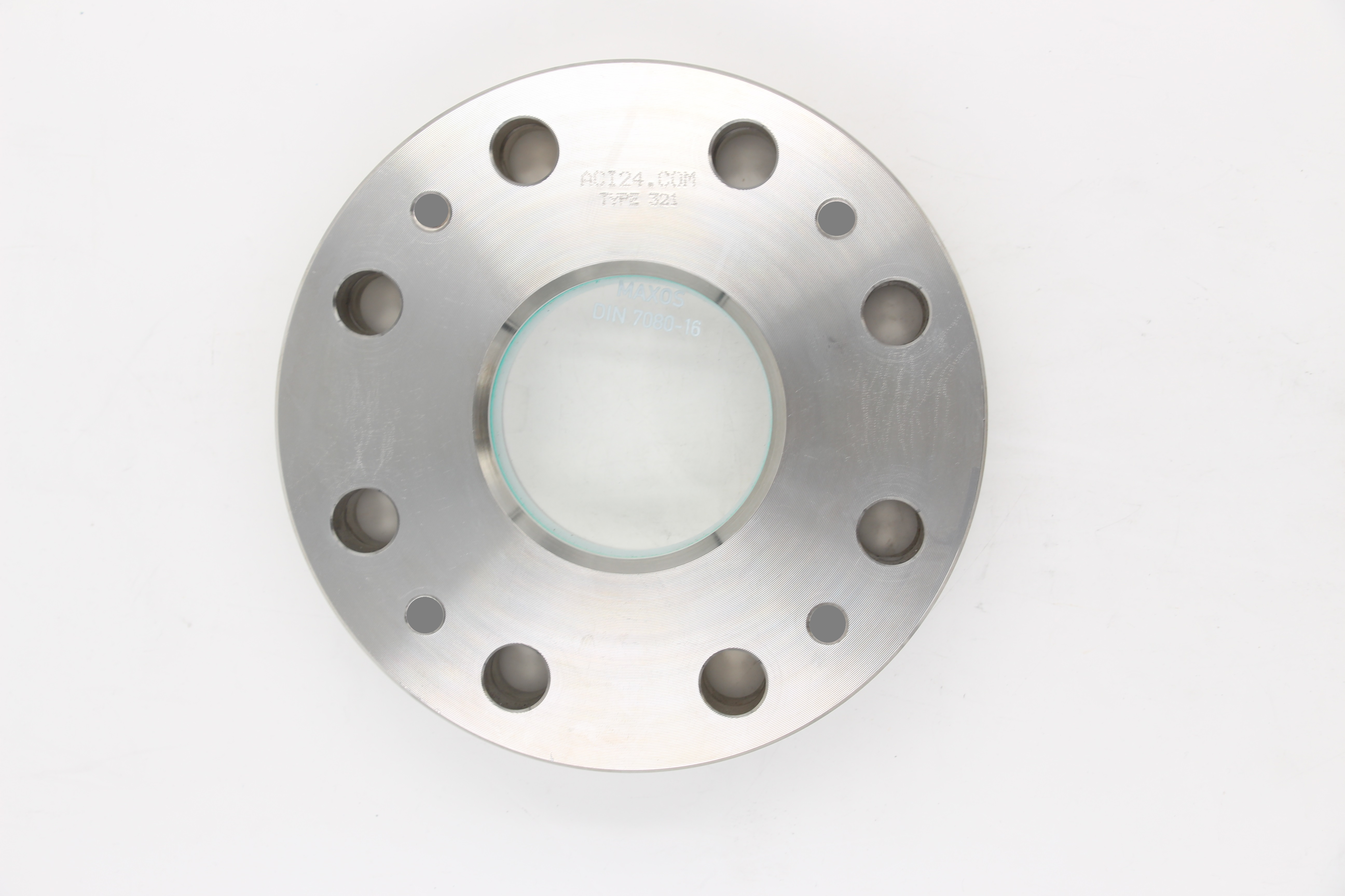 Das ACI Behälterschauglas zum Aufschrauben Typ 321, gemäß DIN 28121, wird medienseitig durch eine PTFE-umhüllte Wellringdichtung abgedichtet. Da sich diese Dichtung im Kraftnebenschluss befindet, liegen die Flanschteile des Schauglases direkt aufeinander und schützen somit die Glasplatte bestmöglich.